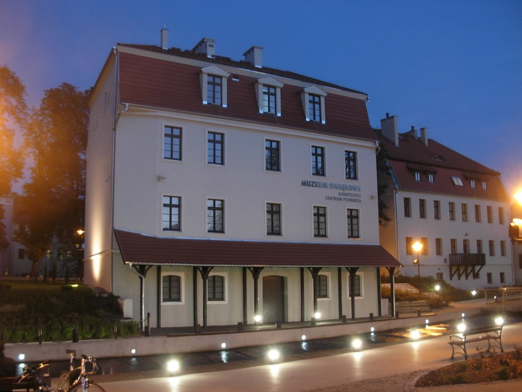 Międzywodzie (Bydgoszcz), Europejskie Centrum Pieniądza